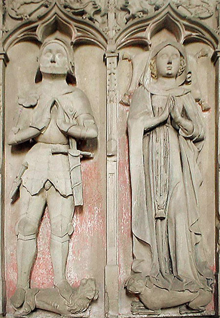 Schmuckvolles Hirschhorn-Epitaph in der Klosterkirche Hirschhorn: Melchior von Hirschhorn († 1476) und Kunigunde von Oberstein († 1457).